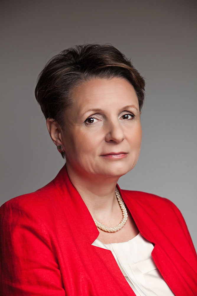 Prof. Małgorzata Omilanowska, Minister Kultury i Dziedzictwa Narodowego